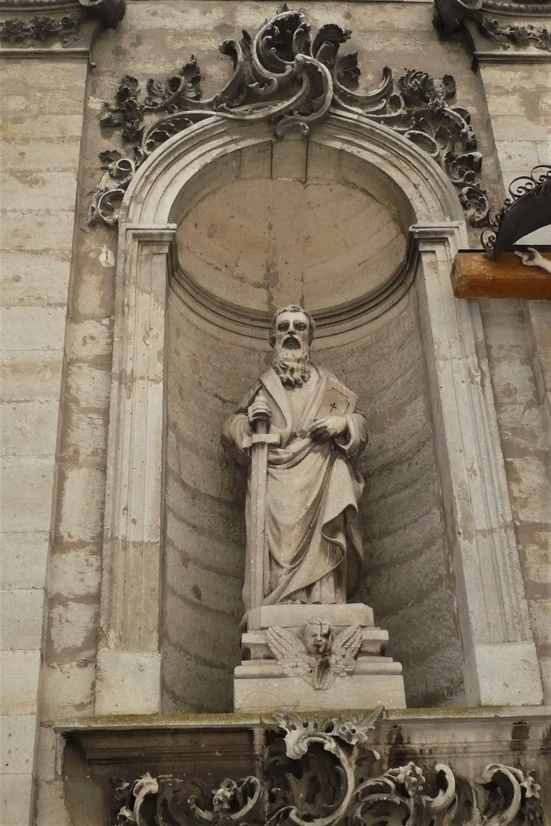 Kościół